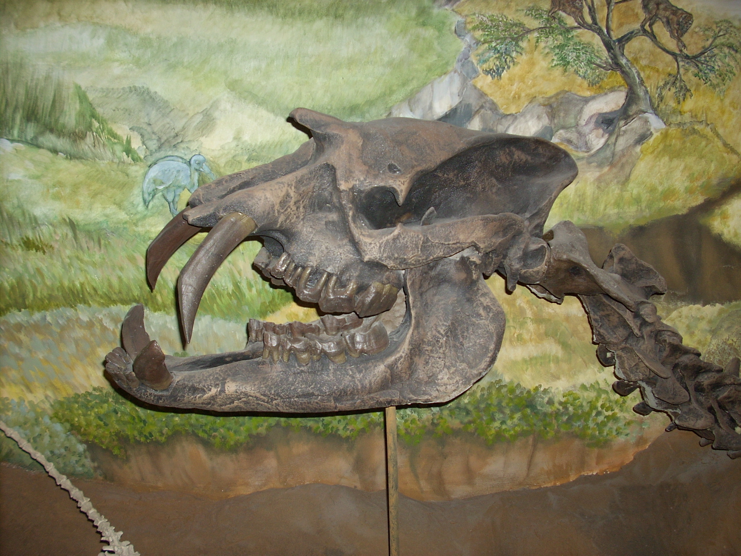 Museo Paleontológico Egidio Feruglio